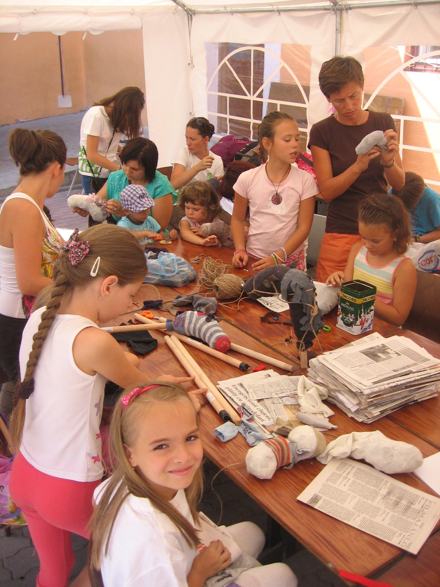 Gyermekfoglalkozás. Lányok tevékenykednek a bábkészítő sátorban.